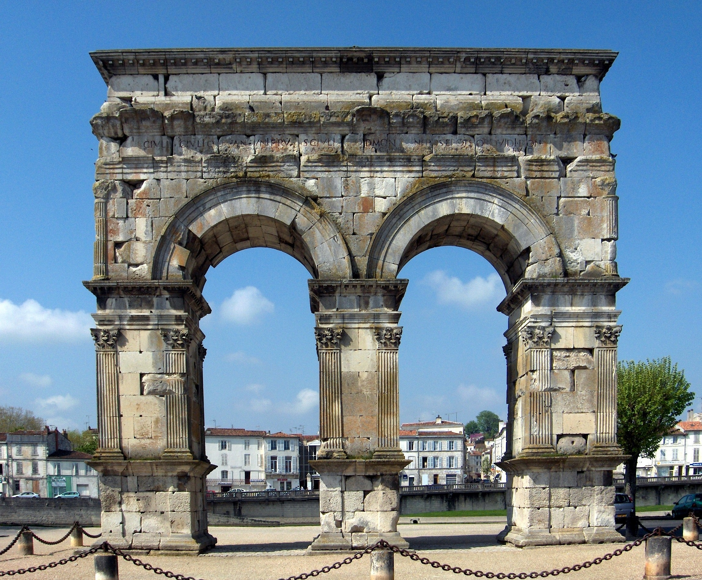 Arc de Germanicus à Saintes, Charente-Maritime, France. CIL XIII 1036 = AE 1980, 626:A: Germanico [Caesa]r[i] Ti(beri) Aug(usti) f(ilio)/ divi Augusti nep(oti) divi Iuli pronep(oti) auguri/ flam(ini) August(ali) co(n)s(uli) II imp(eratori) II/ Ti(berio) Caesar[i divi Aug(usti) f(ilio) divi Iuli nep(oti) Aug(usto)]/ pontif(ici) maxs(imo sic) [co(n)s(uli) III] imp(eratori) VIII [tri]b(unicia) pot(estate) [XXI]/ Dr[us]o Caesari [Ti(beri) Aug(usti)] f(ilio)/ [divi Augusti] nep(oti) divi Iuli/ [pronep(oti) co(n)s(uli)] pontifici auguri B: C(aius) Iulius C(ai) Iuli Catuaneuni f(ilius) Rufus [C(ai) Iul(i) Agedomopatis nepos Epotsorovidi pronep(os) Volt(inia)]/ sacerdos Romae et Augusti ad aram [quae est ad Confluentem praefectus fabrum d(e) s(ua) p(ecunia) f(ecit)]// C(aius) Iuli[us] C(ai) Iuli C[a]tuaneuni f(ilius) Rufus C(ai) Iulii Agedomo[patis] nepos Epotsorovidi pron(epos) V[olt(inia)]/ [sacerdos Romae et Au]gusti [ad a]ram qu[a]e est ad Confluent[em praefectus fab]ru[m] d(e) [s(ua) p(ecunia) f(ecit)]